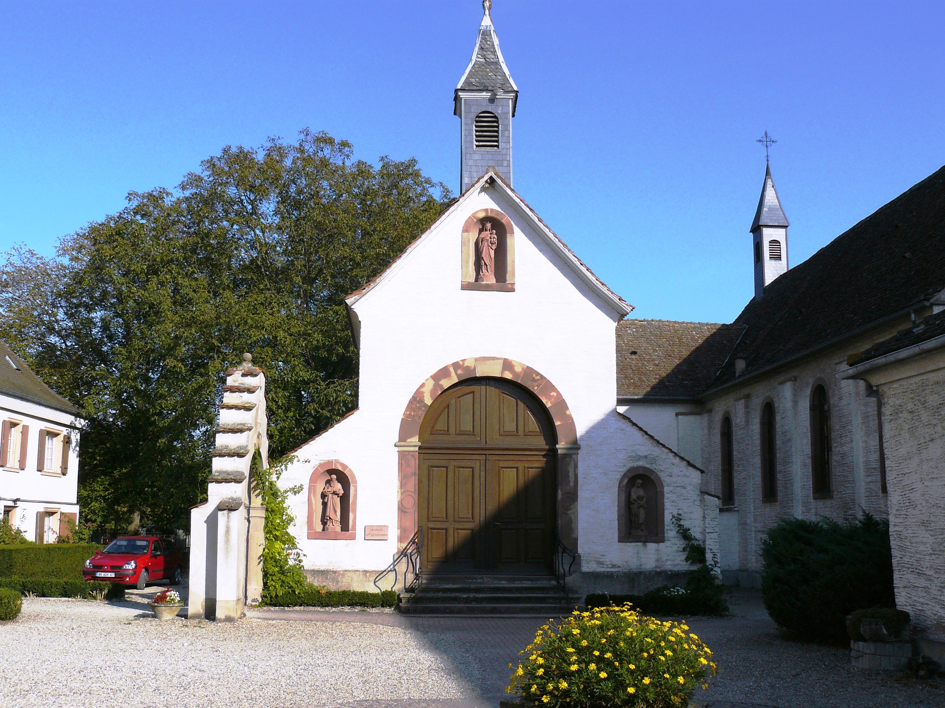 Friesenheim (Bas-Rhin), hameau de Neunkirch, Chapelle Notre-Dame-du-Perpétuel-Secours, des saints-auxiliateurs (chapelle de pèlerinage) (1879)